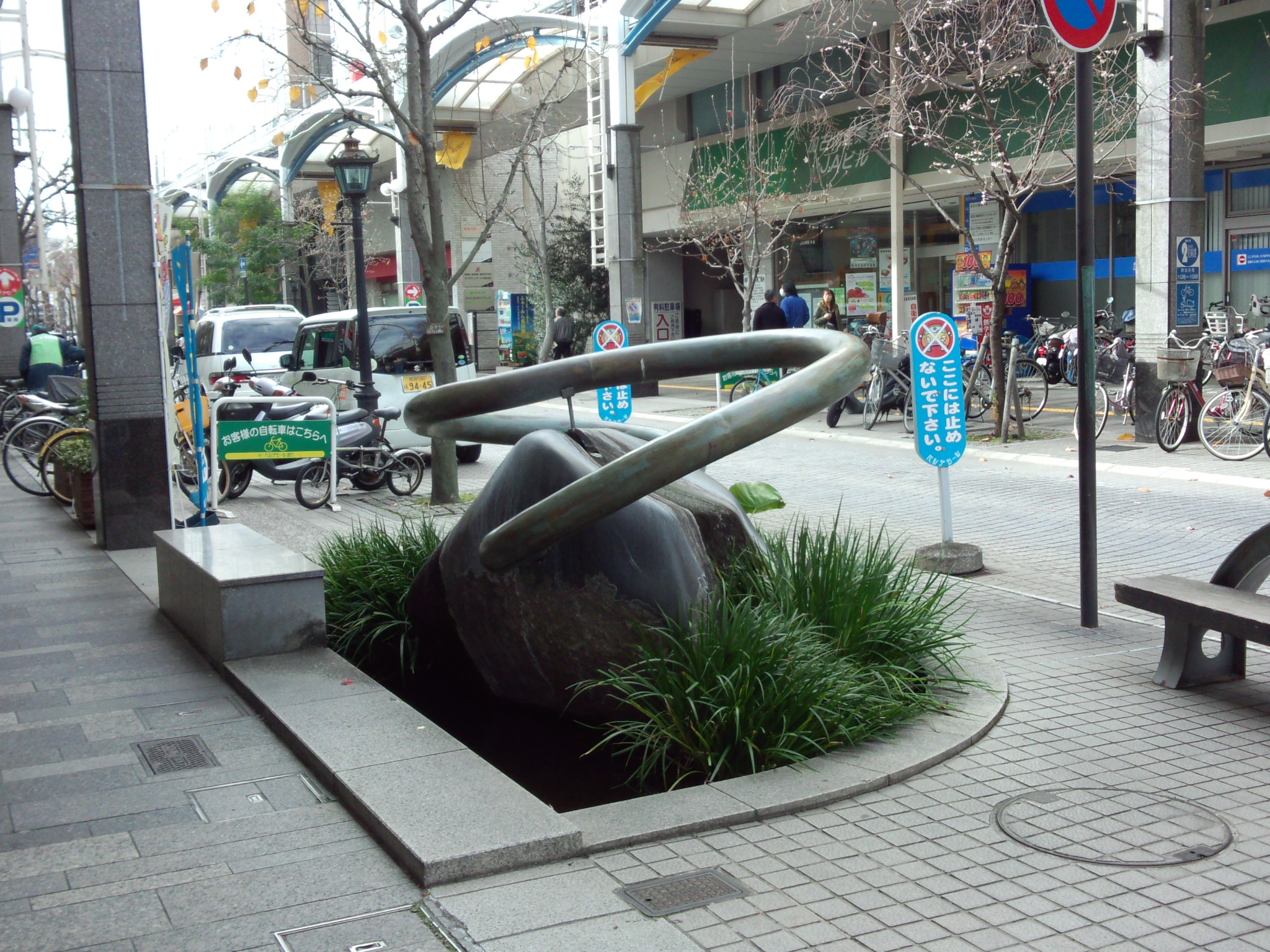 ベルデモール加古川（わき水）